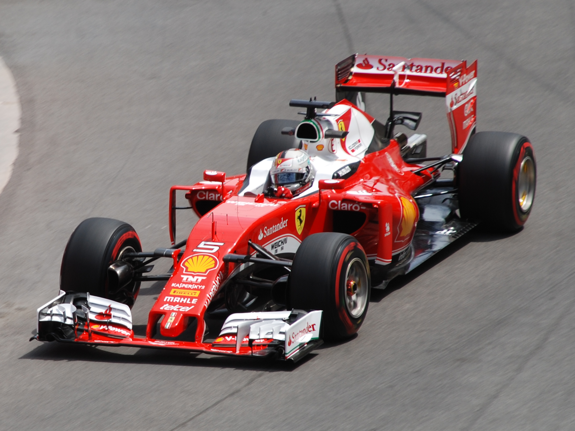 2016 Monaco F1 Grand Prix. Sebastian Vettel, Ferrari SF16-H.